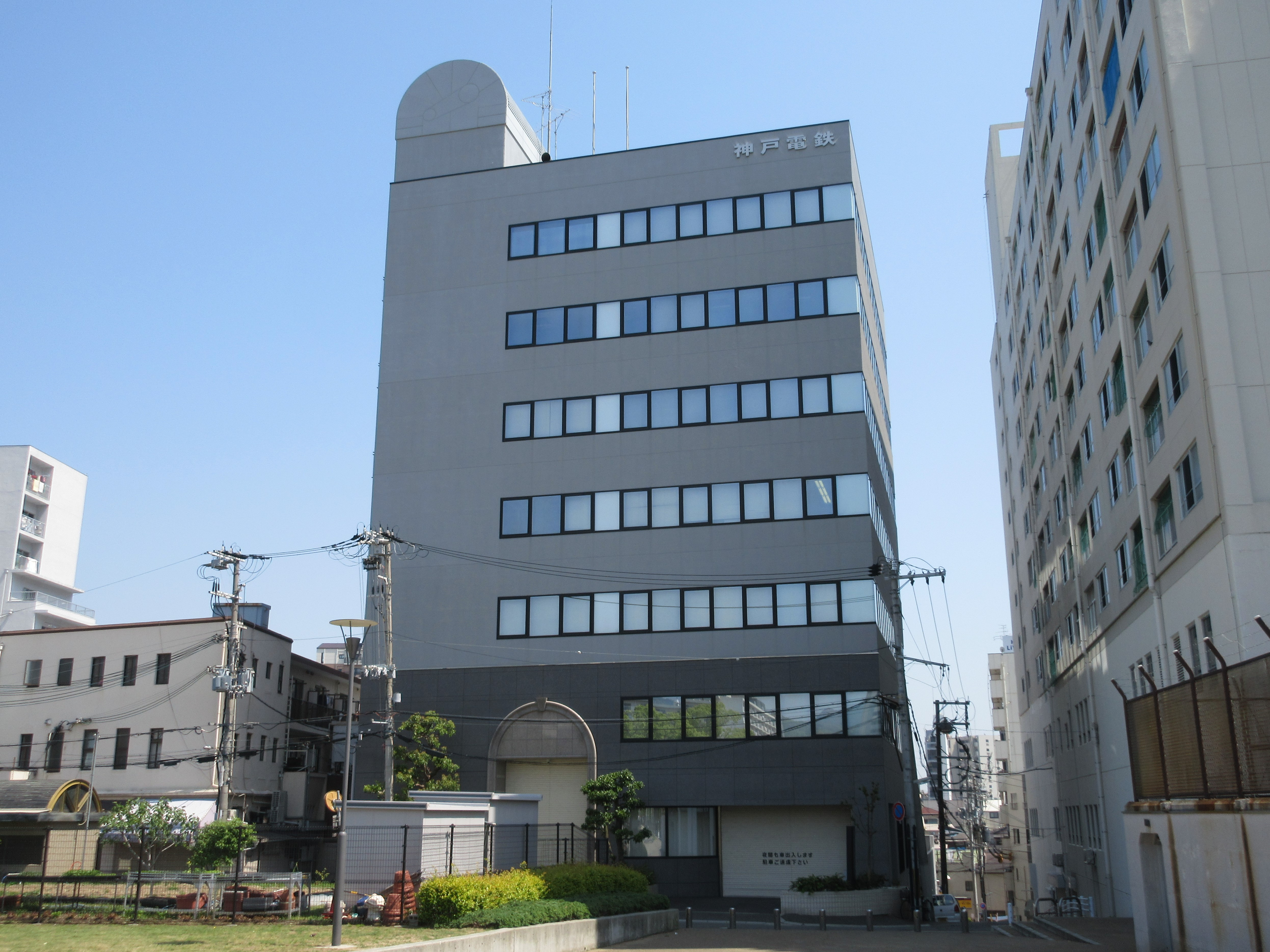 神戸電鉄本社ビル